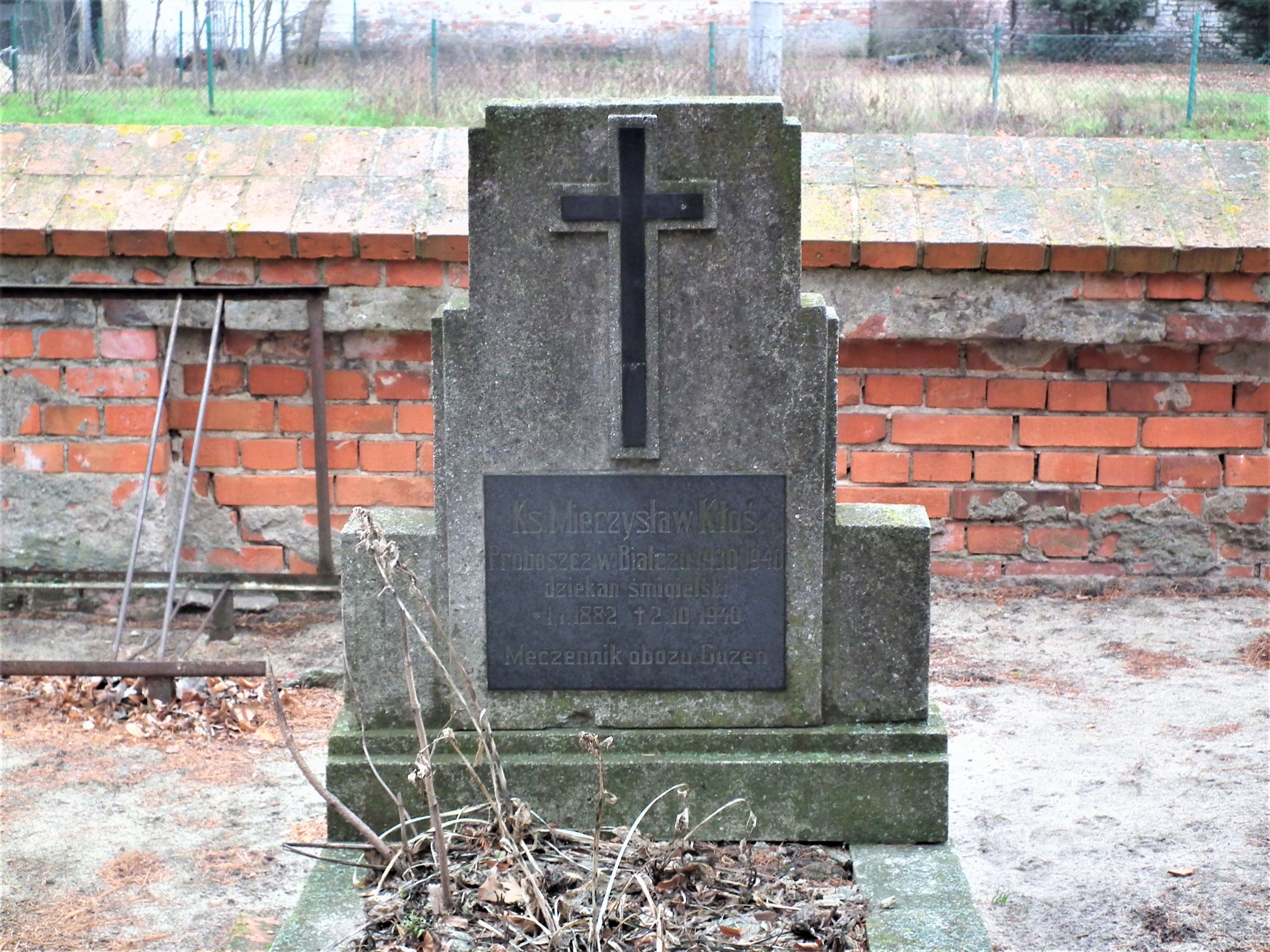 Otoczenie kościoła Wszystkich Świętych w Starym Białczu.